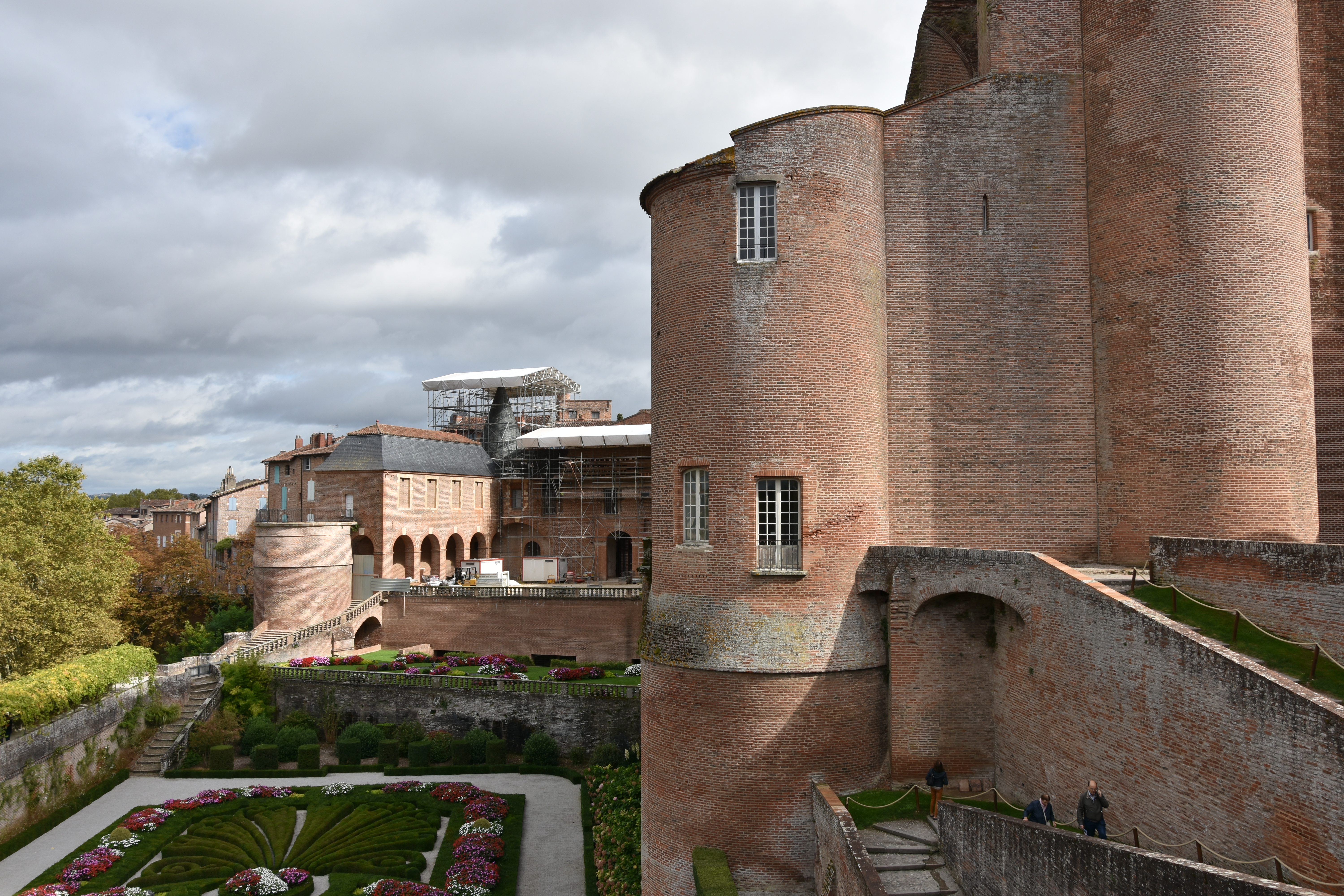 Palais de la Berbie Albi 9-10-2019 14-49-46